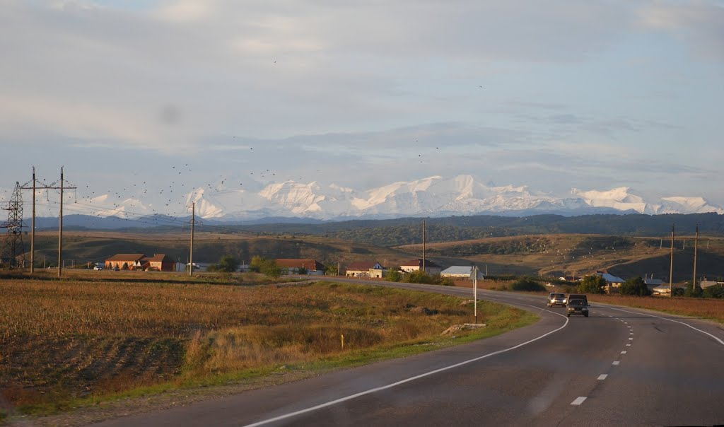 Ислъамей